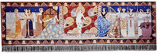 Salomes Dans 1900